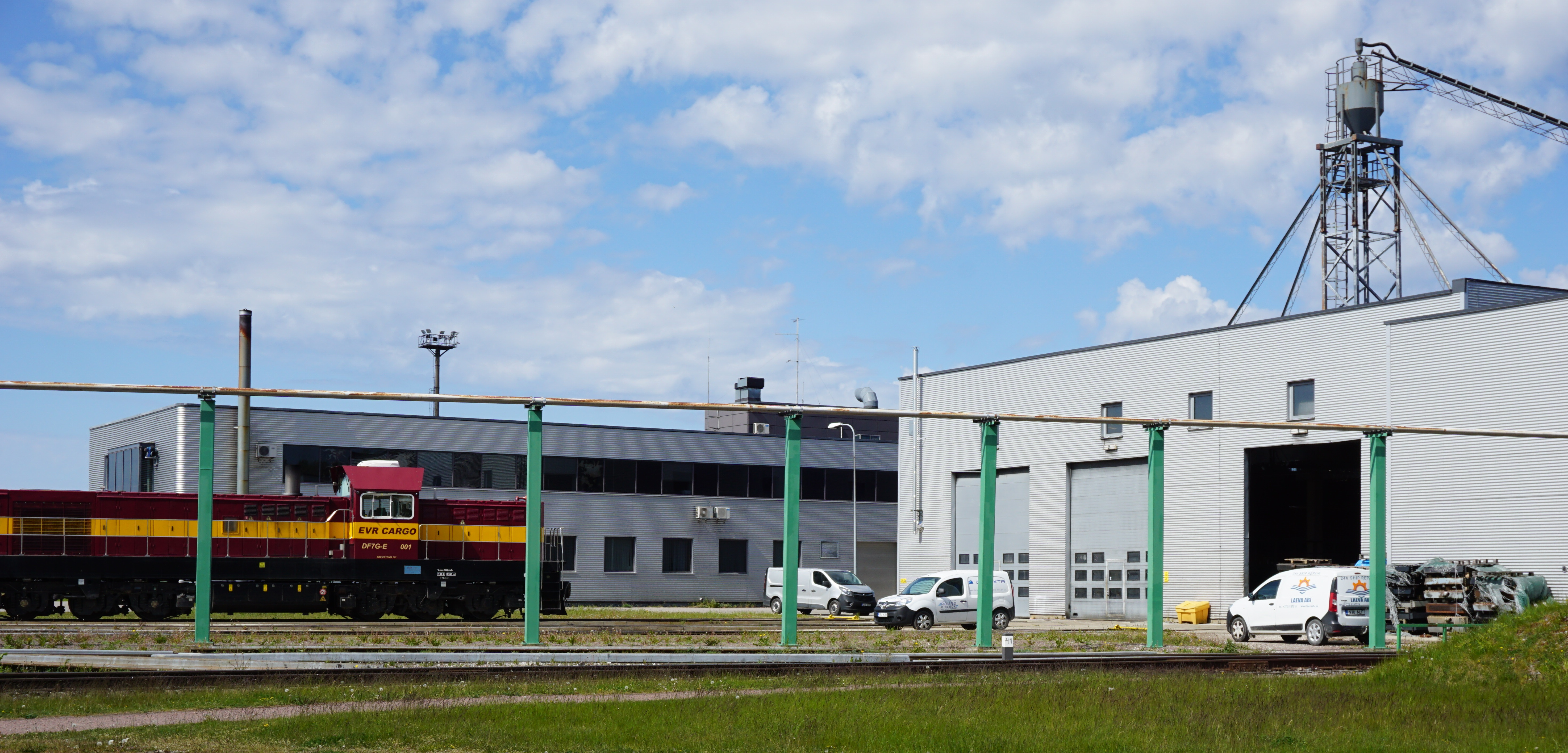 Operaili Muuga veduridepoo. Esiplaanil Hiina päritolu manöövrivedur DF7G-E.